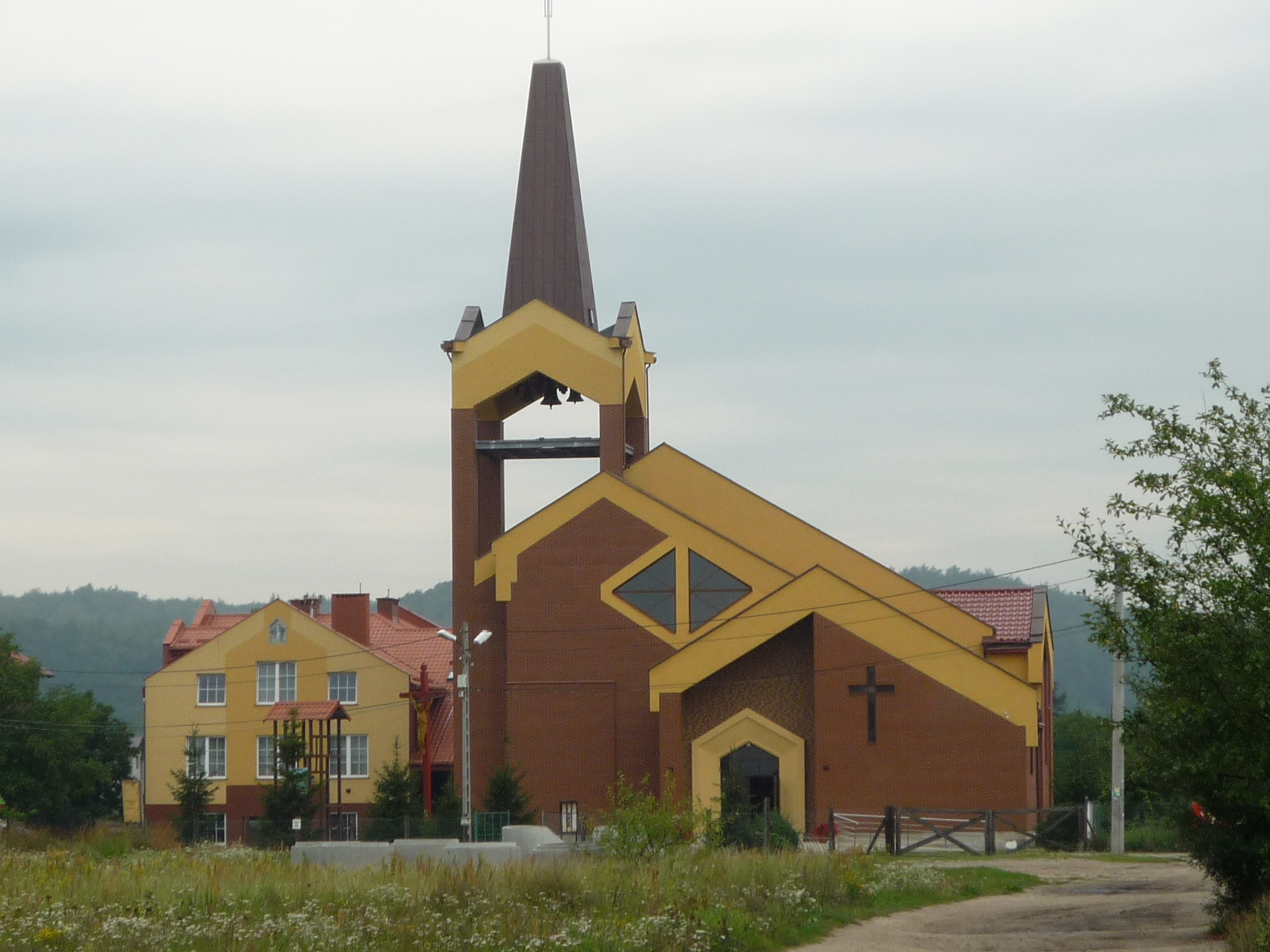 Rumia - rzymskokatolicki kościół parafialny pw. bł. Edmunda Bojanowskiego.